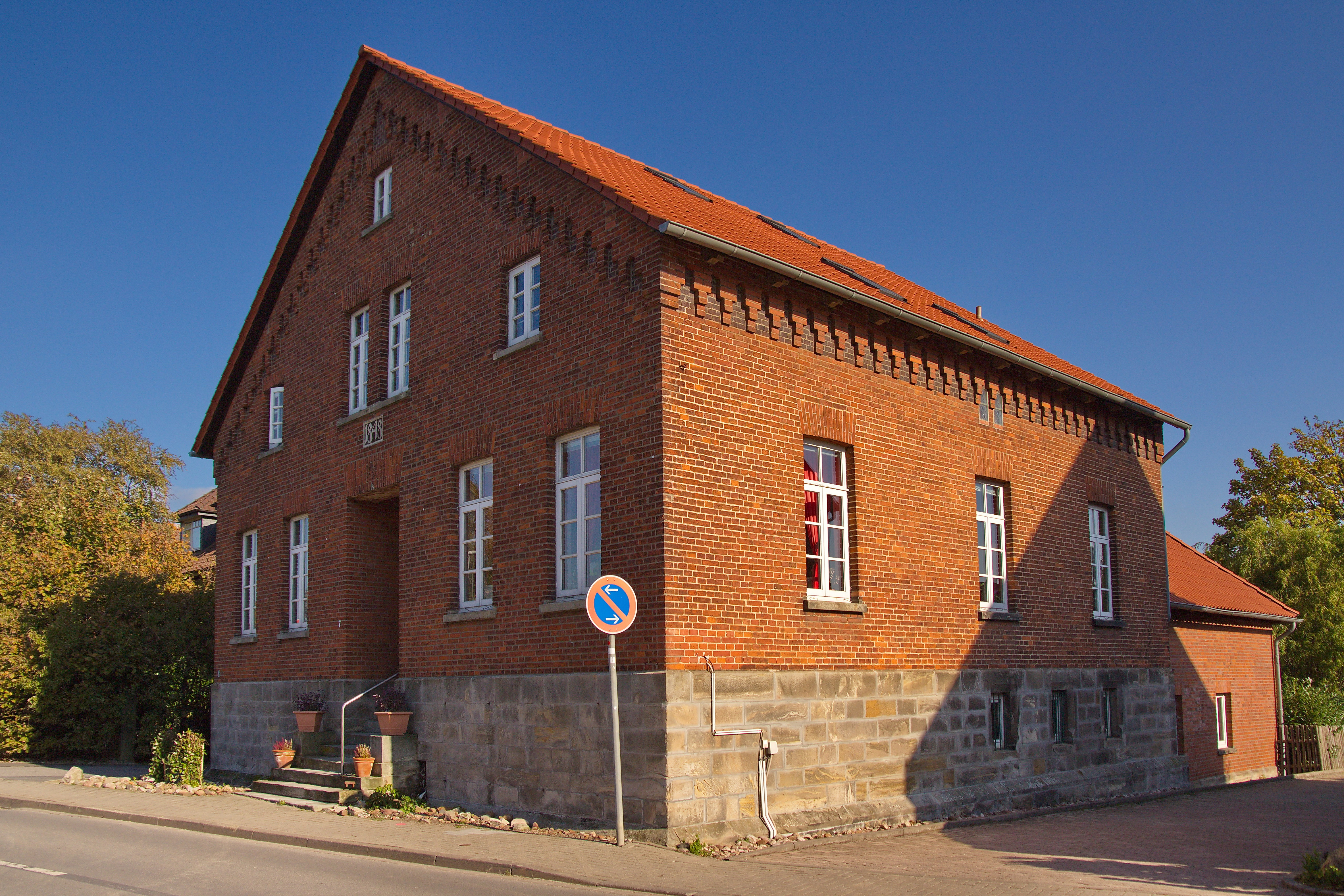 Bockmerholzstraße 7 in Wülferode (Hannover), Niedersachsen, Deutschland